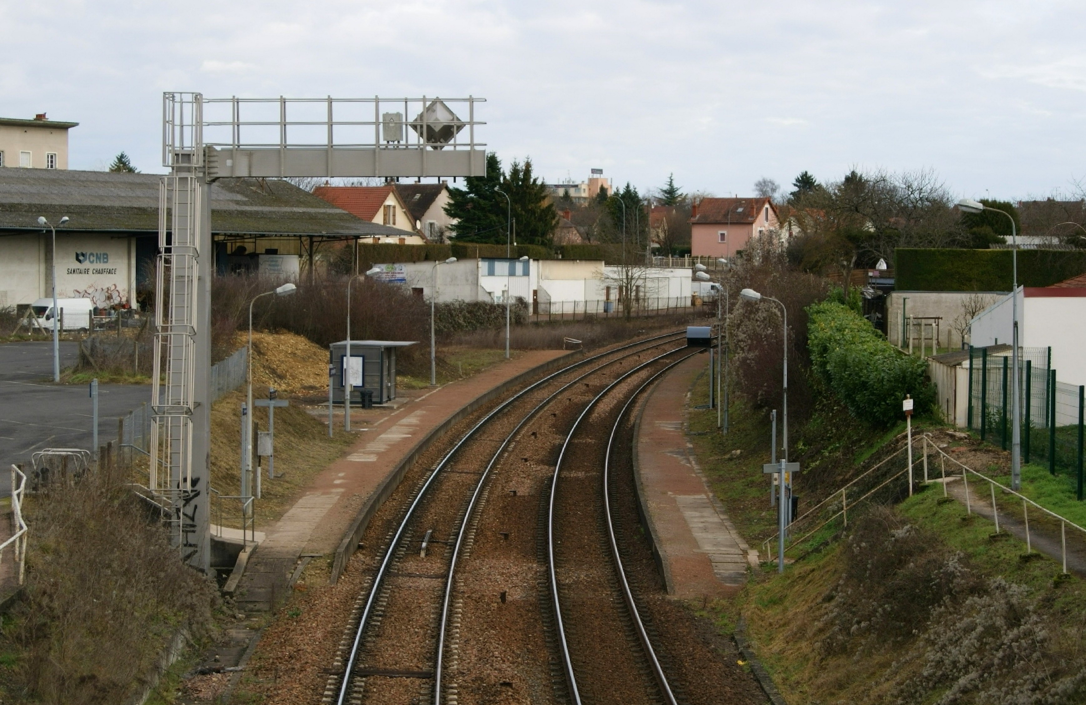 Halte de Nevers les Perrières. Le technicentre SNCF de Varennes-Vauzelles, non visible à l'image, se trouve à gauche dans le dos du photographe.